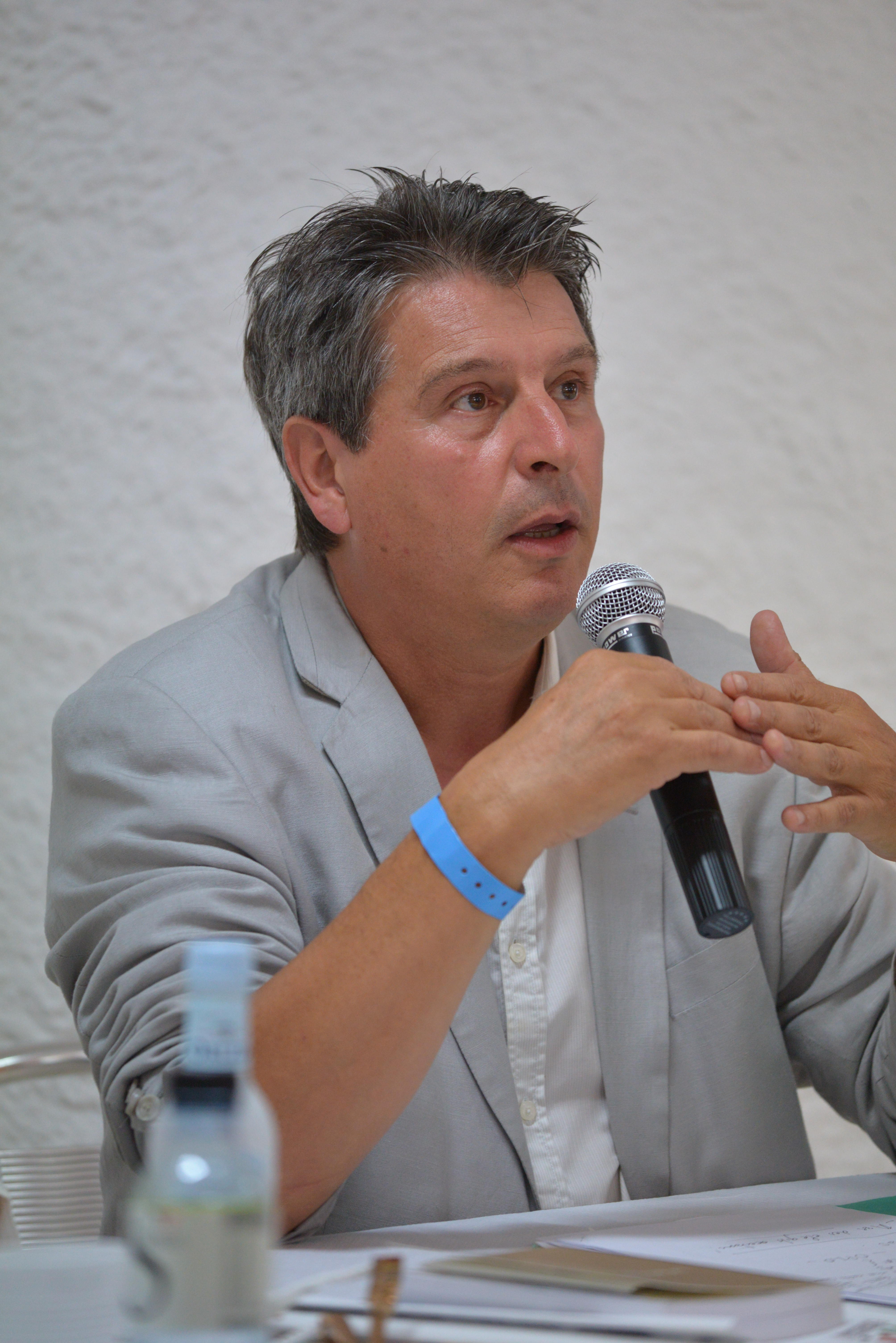 David Grosclaude à l'occasion de l'université d'été de Régions et peuples solidaires en Corse le 25 août 2014